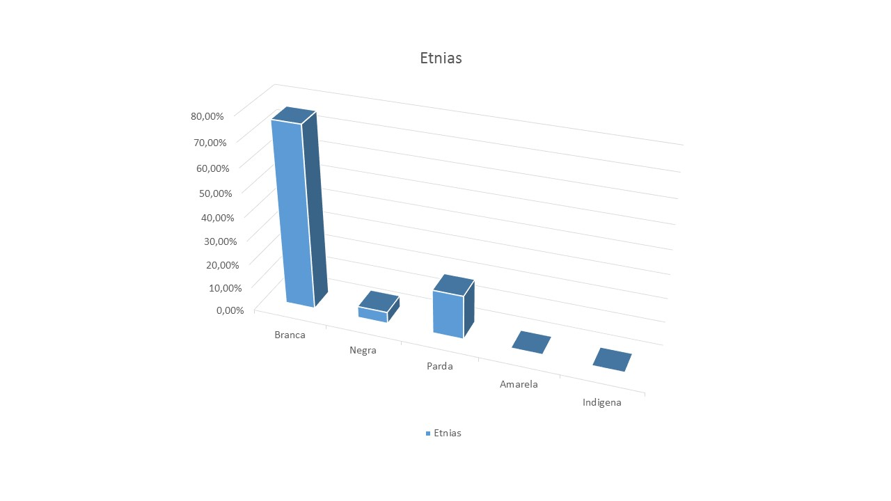 Gráfico mostra as etnias da população itajubense